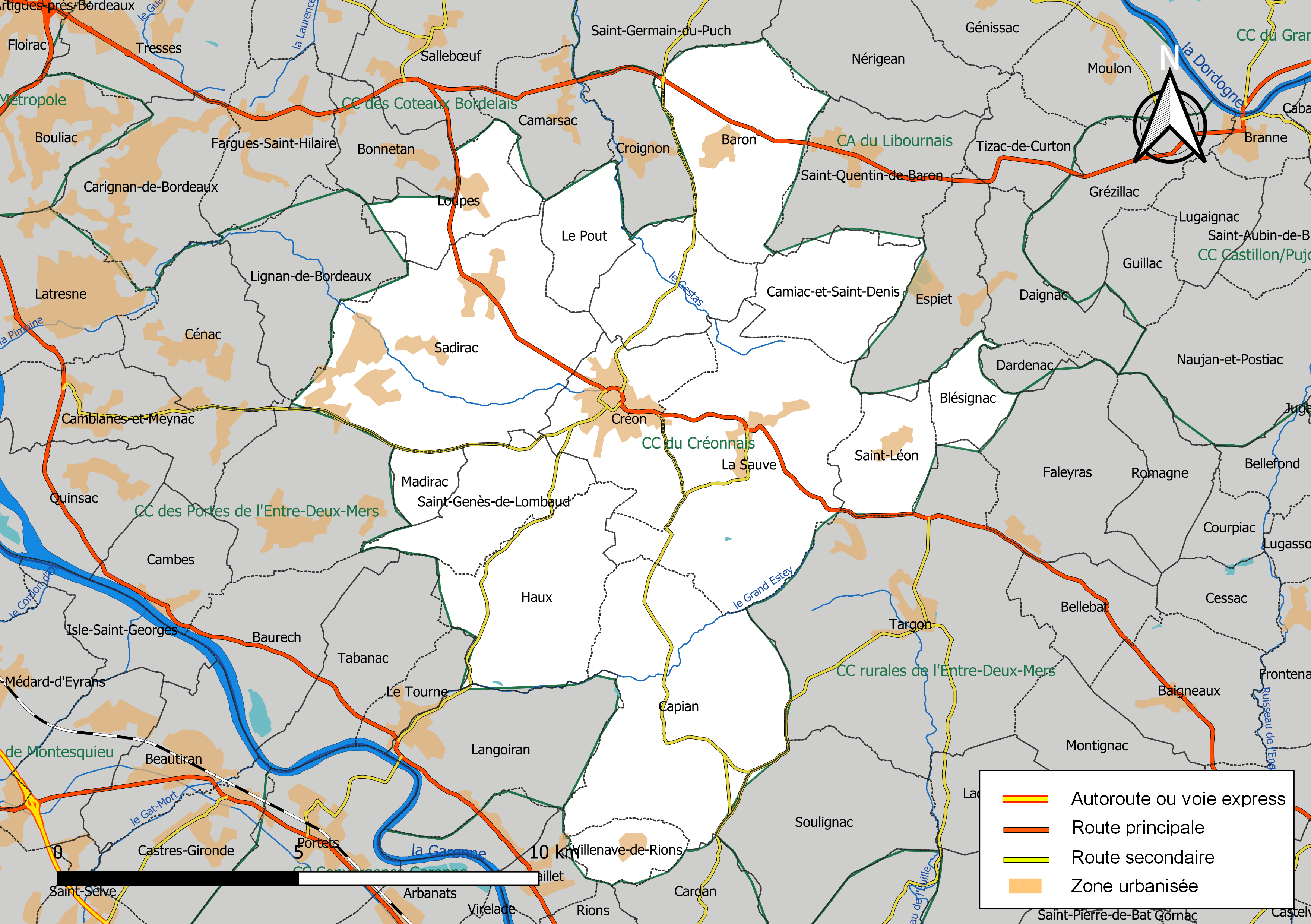 Carte géographique de la Communauté de communes du Créonnais, département de la Gironde, France. Composition au 1er janvier 2019.